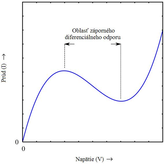 Priebeh prúdu v Gunnovej dióde v závislosti na napätí